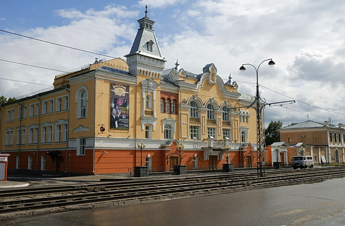 Palazzo della Filarmonica nel Territorio dell'Altaj